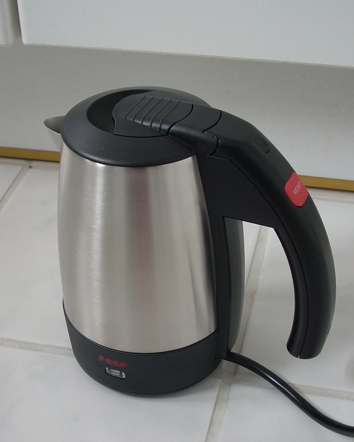 Veralteter Wasserkocher ohne Sockel und ohne Temperaturregulierung mit Edelstahlgefäß für 0,5 l